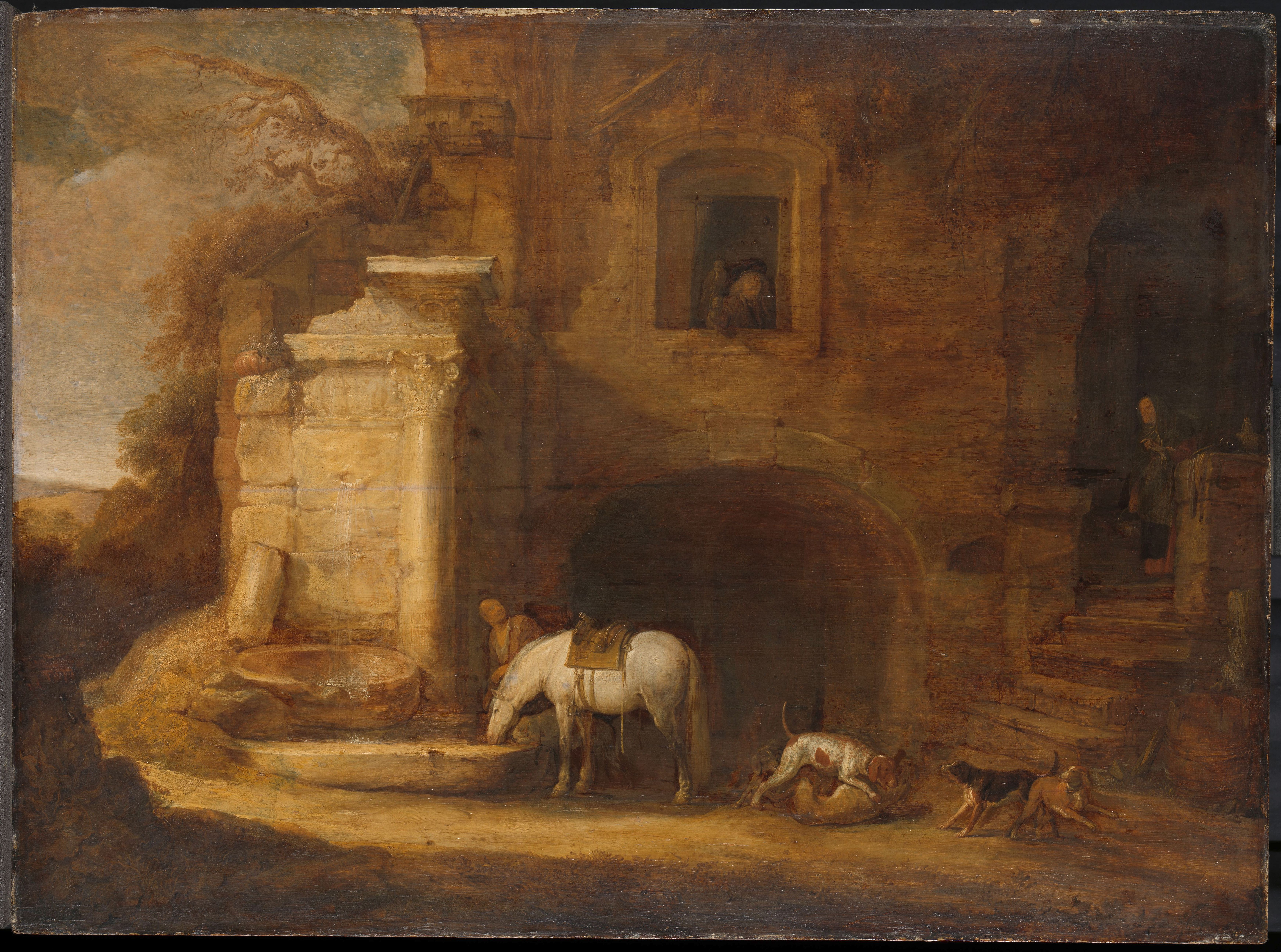 De thuiskomst van de valkenier. Voor een huis drinkt een paard uit een waterbak naast enkele vechtende jachthonden. Een man met een valk op de hand kijkt door een venster naar buiten.